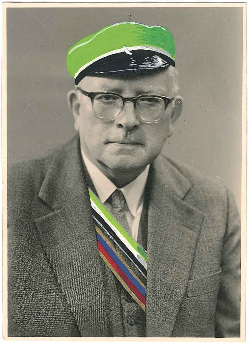 Portätfotografie von Prof. Dr. med. Franz Stadtmüller (1889-1981)